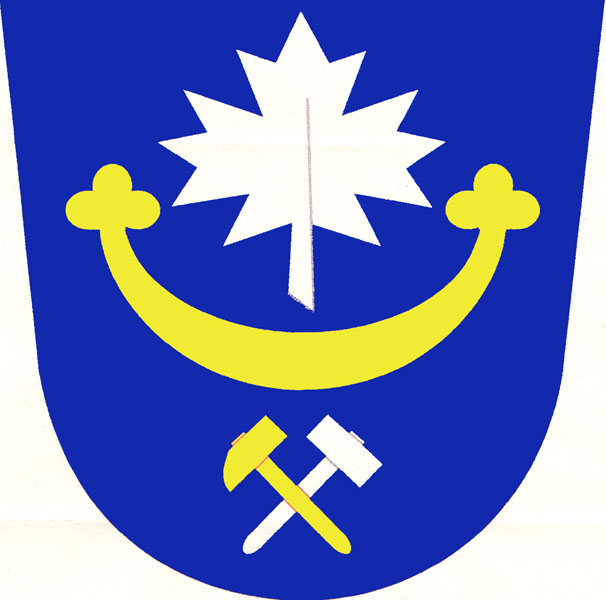 Znak obce Javůrek